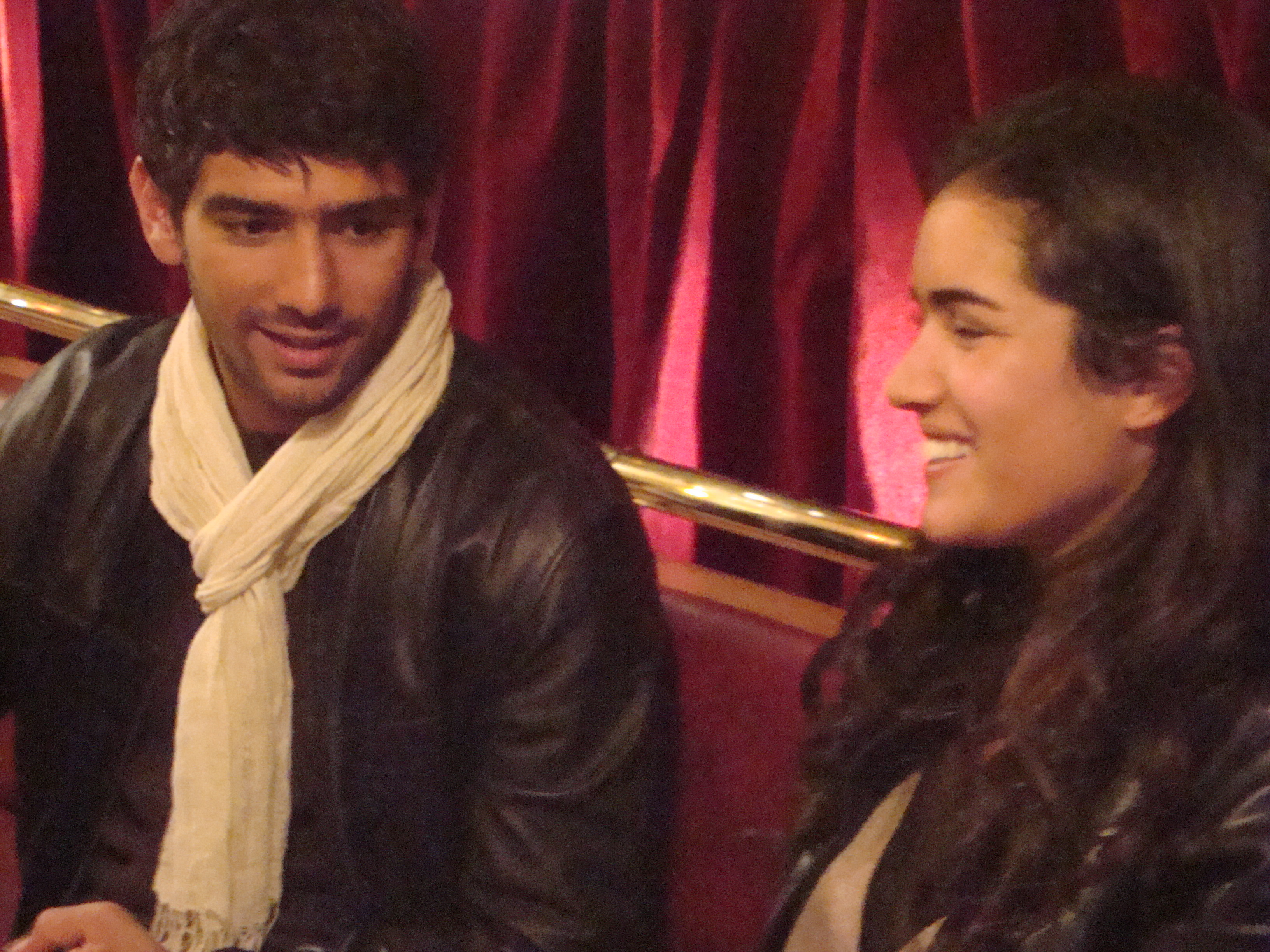 Sabrina Ouazani et Salim Kechiouche lors de l'avant-première du téléfilm "Tenir tête" à Aubervilliers